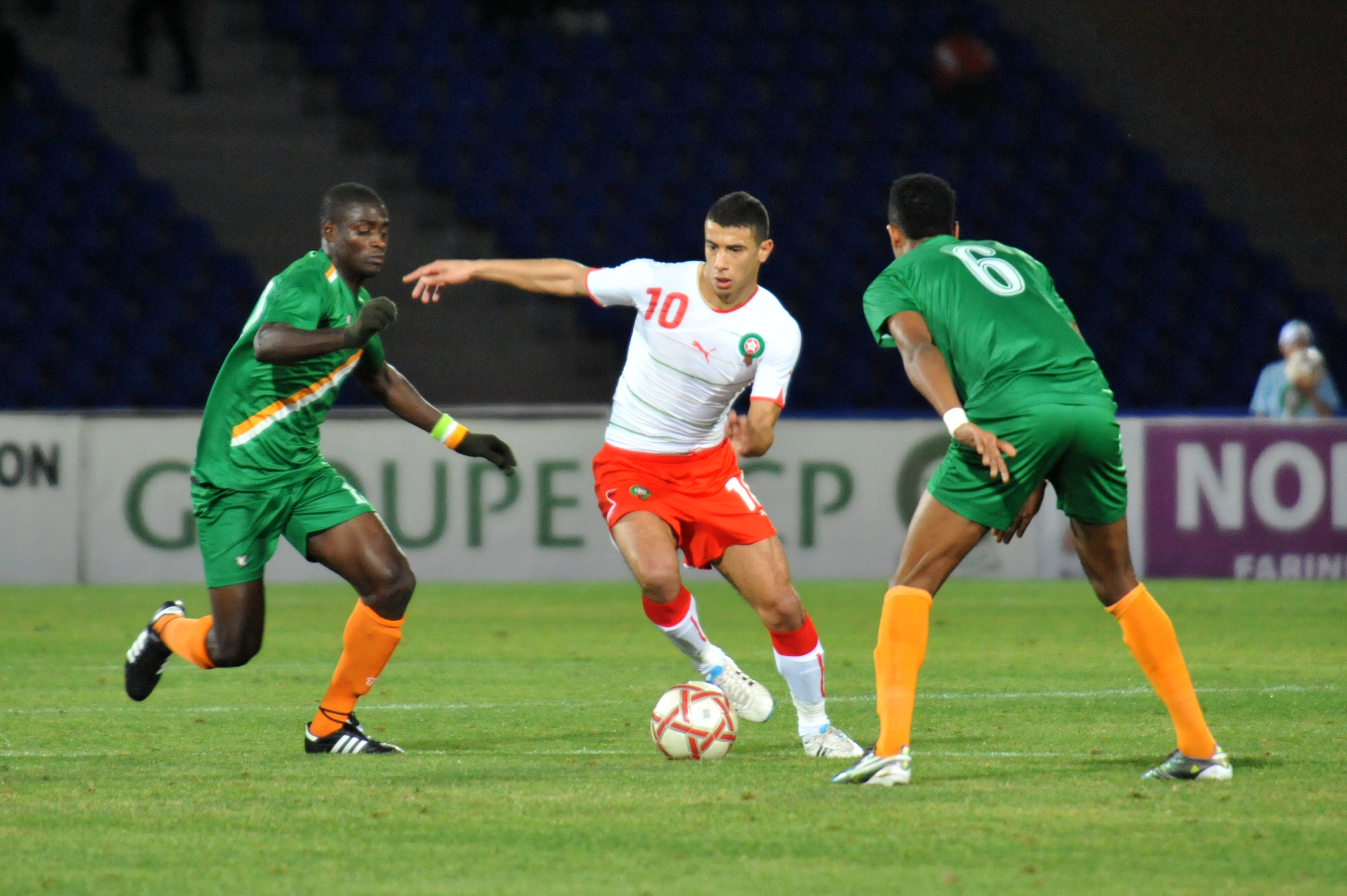 Younès Belhanda, Maroc-Niger (09/02/2011).